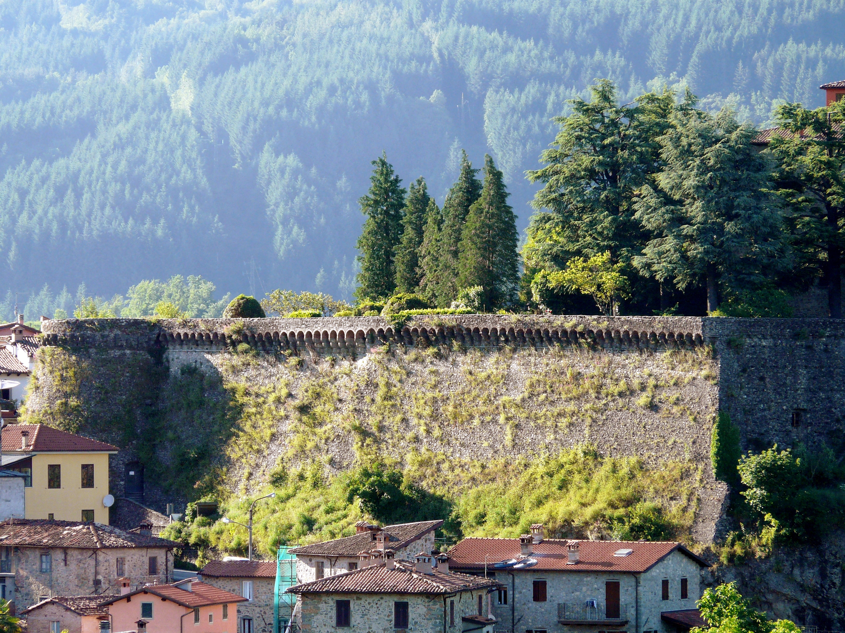 Fortezza di Camporgiano, Toscana, Italia